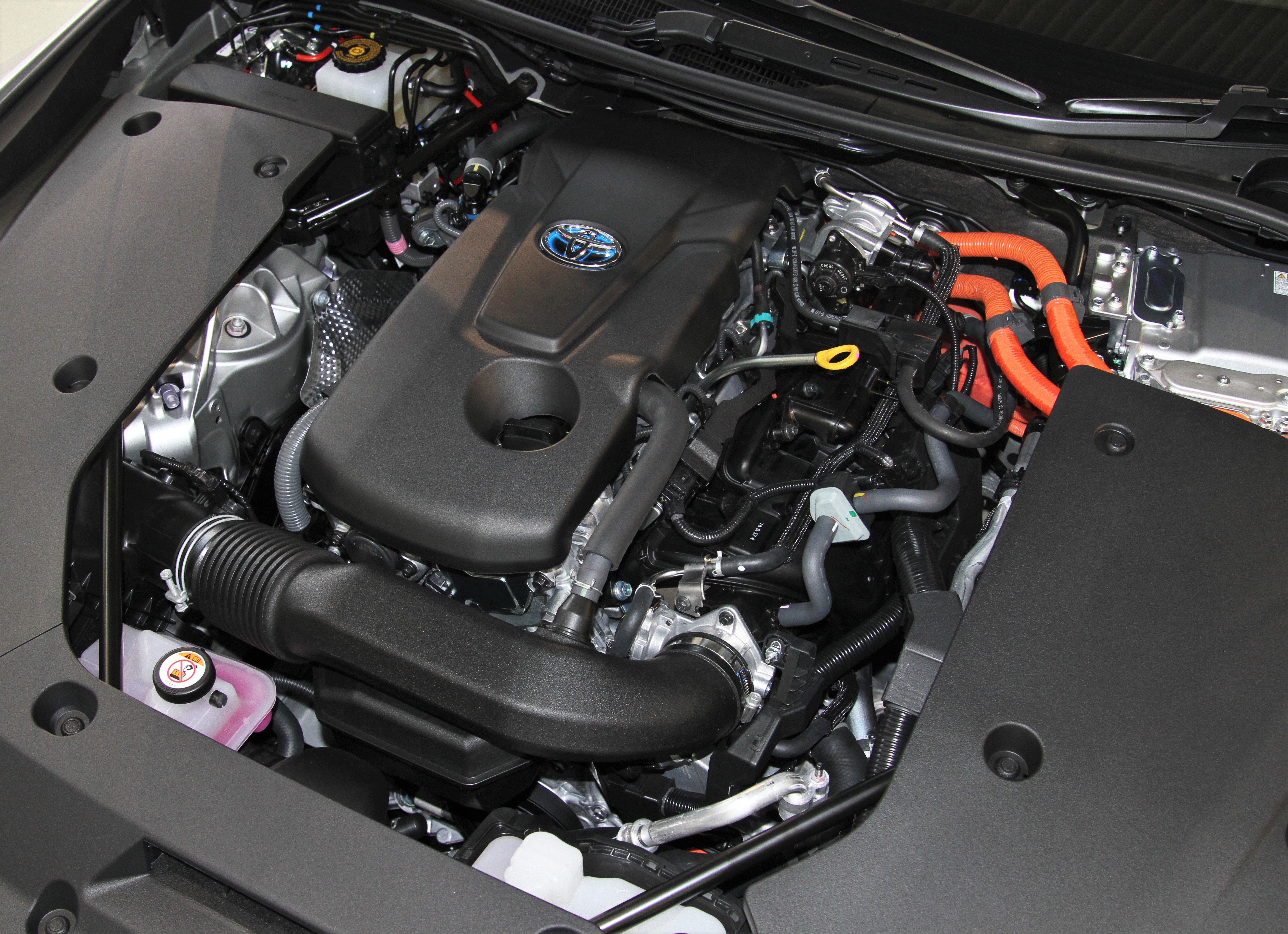 Toyota Crown (S220)